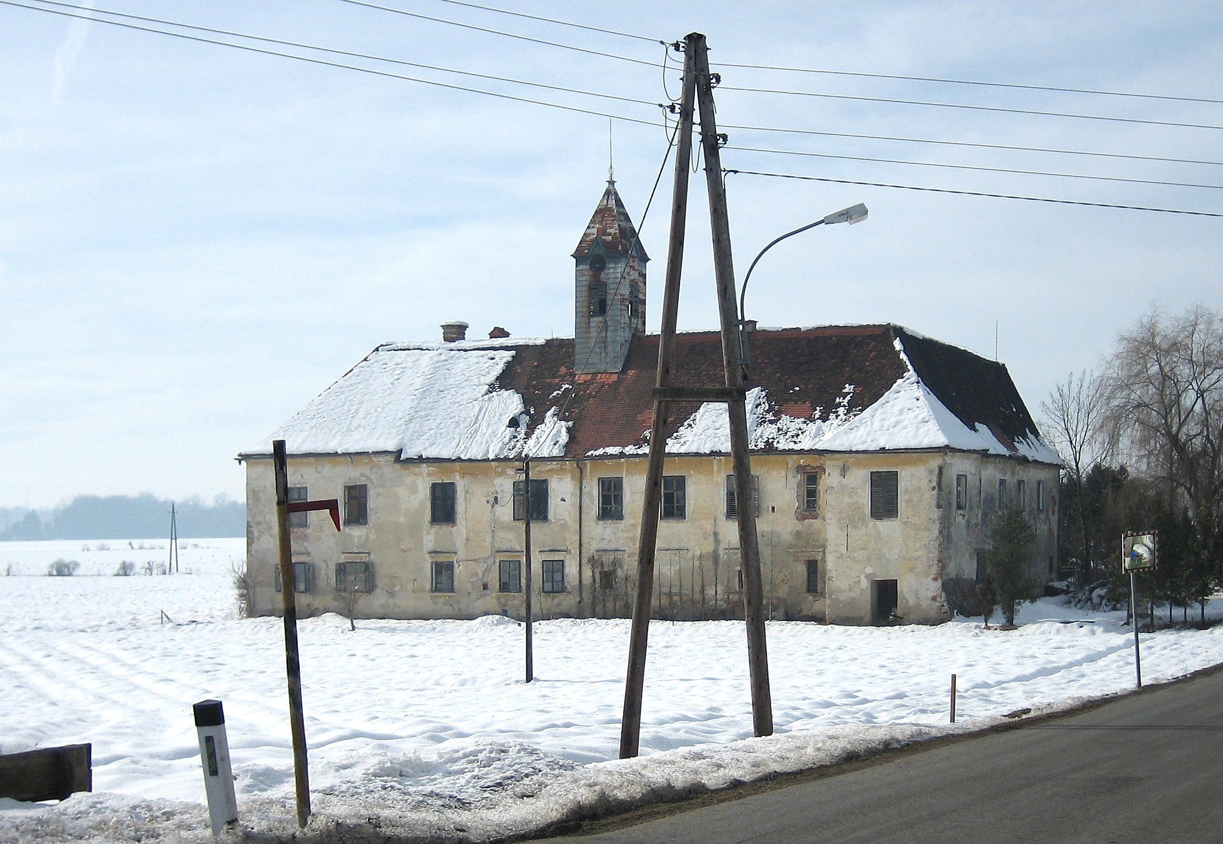 Schloss Rohr